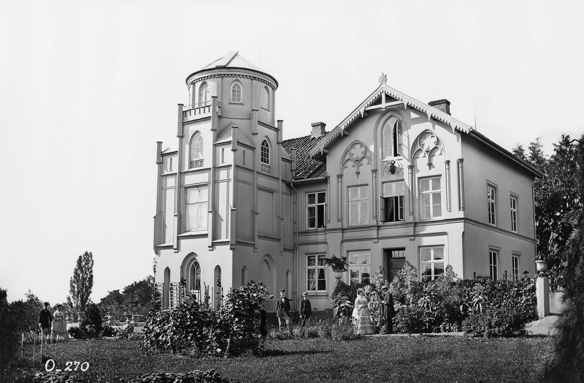 Våningshuset ved Tullinberget løkke, ca. 1863–83. Huset lå omtrent ved Skovveien 7 og ble revet før dagens leiegård ble oppført i 1937. Foto: Ole Tobias Olsen. Fra Byhistorisk samling hos Oslo Museum.